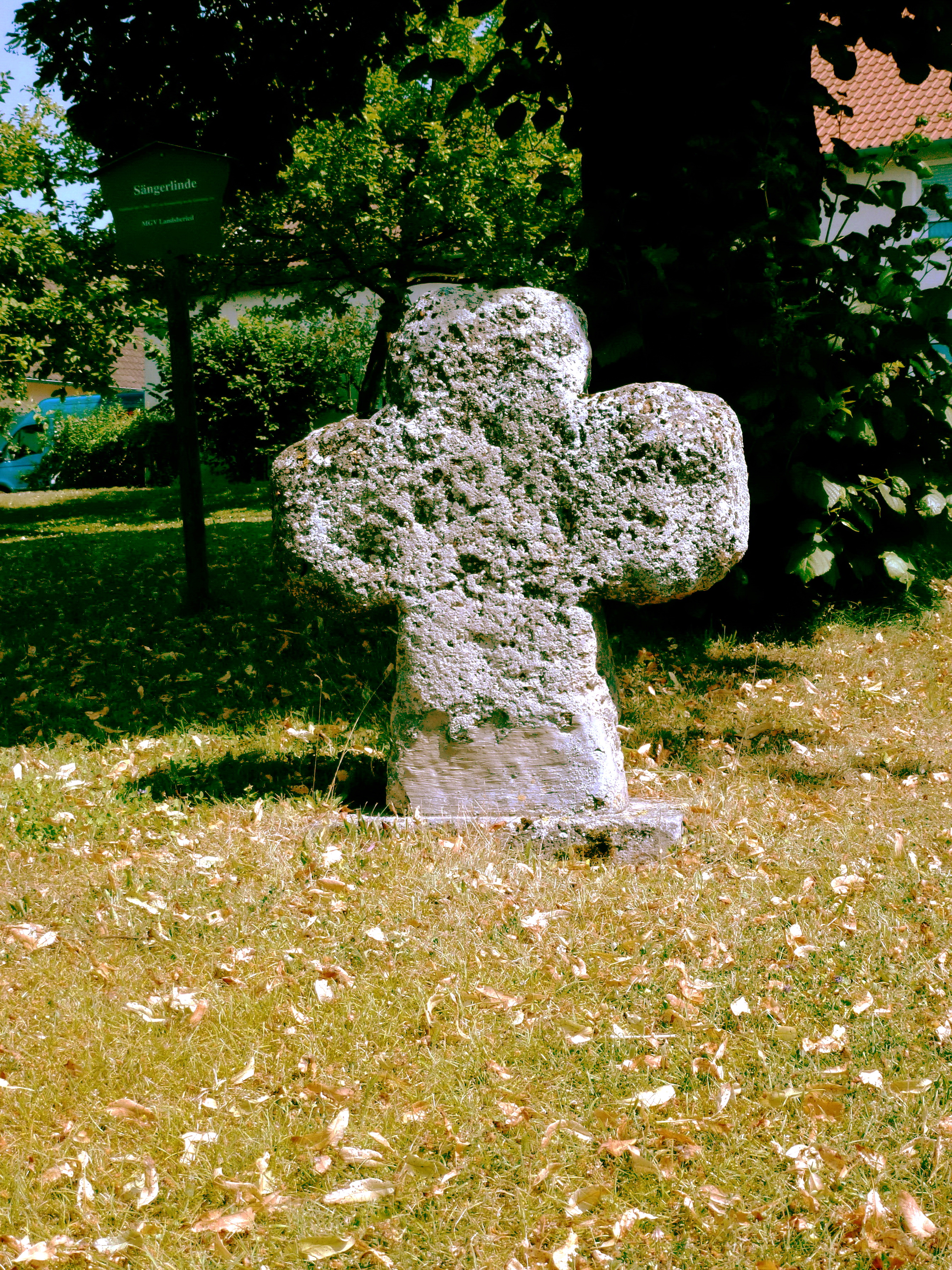 Landsberied, Ecke Hauptstr./Schloßstr.: Sühnekreuz aus Kalktuffstein, Sockel restauriert, Höhe x Breite x Tiefe = 86 cm x 76cm x 27cm